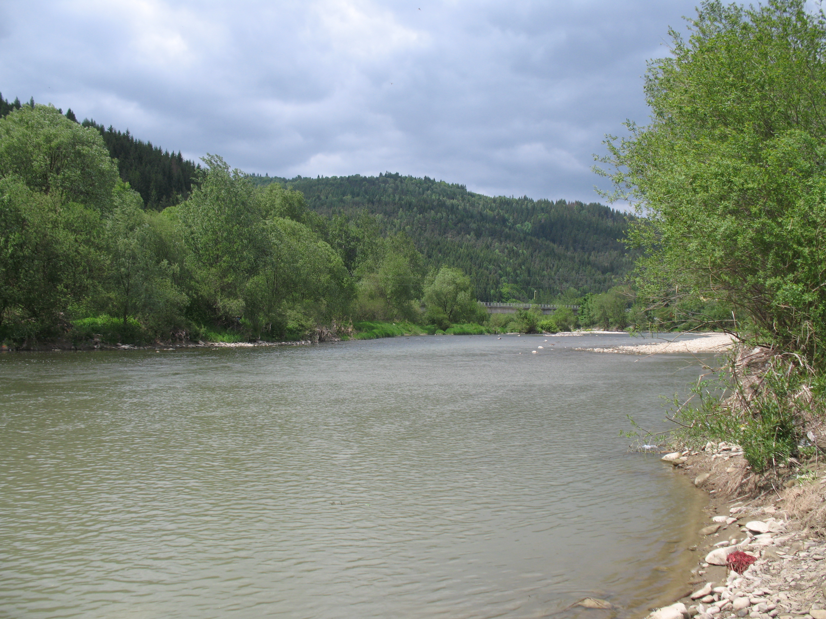 Kiszuca folyo Karásznónál